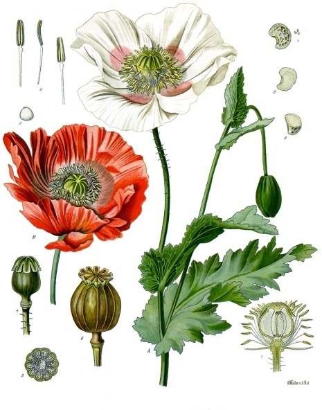 Schlafmohn. A Pflanze der weissen Unterart in natürl. Grösse; B Blüthe der rothen Unterart, desgl.; 1 Stempel mit Staubgefässen, desgl.; 2 Staübgefässe, von verschiedenen Seiten, vergrössert; 3 Pollen, unter Wasser gesehen, desgl.; 4 Stempel, natürl. Grösse; 5 derselbe im Querschnitt, desgl.; 6 reife Fruchtkapsel, desgl.; 7 Same, natürl. Grösse und vergrössert; 8 derselbe im Längsschnitt, vergrössert; 9 derselbe im Querschnitt, desgl.